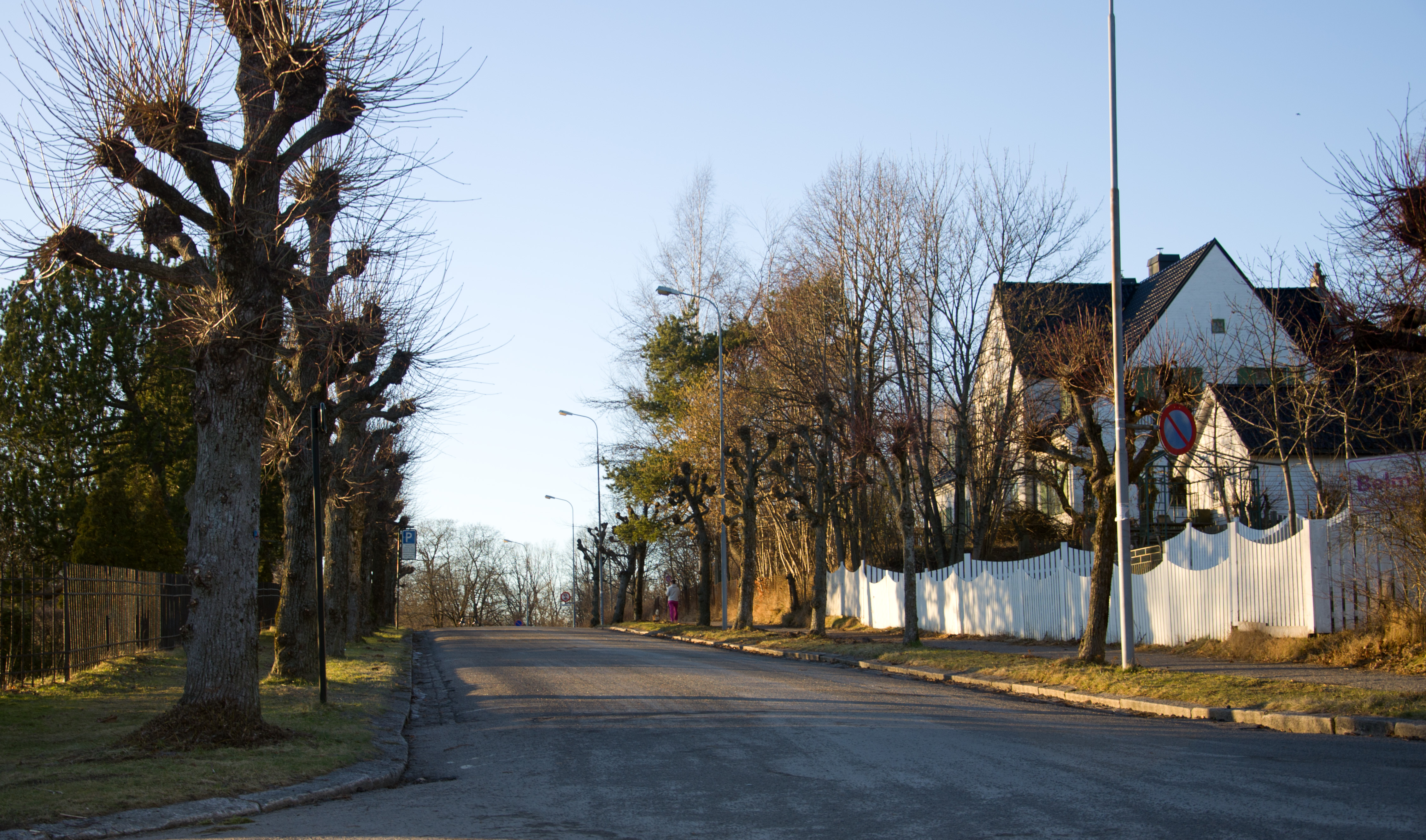 Kaptein Hoffs allé i Tønsberg